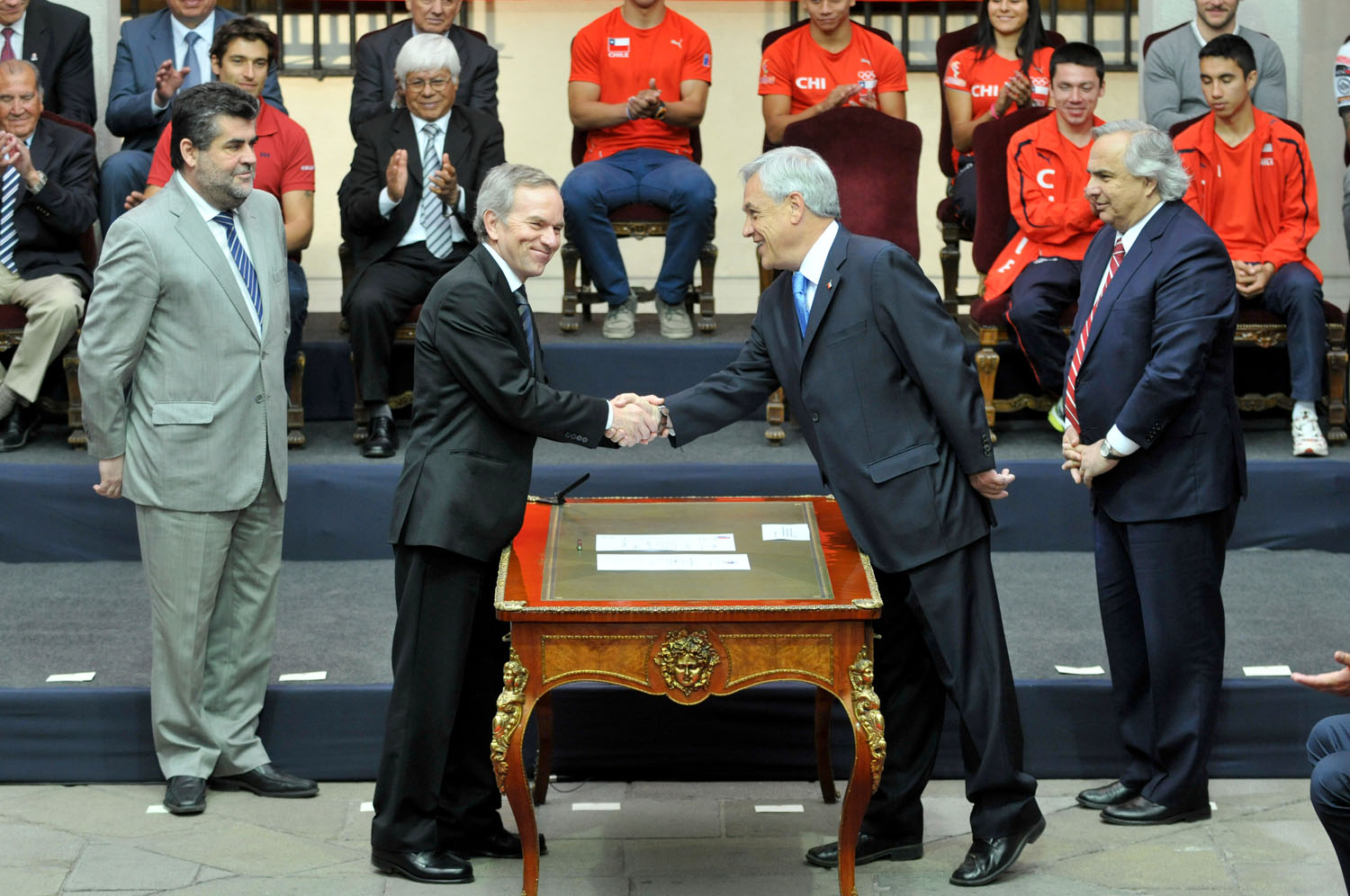 Nombramiento del primer Ministro del Deporte de Chile, Gabriel Ruiz Tagle.